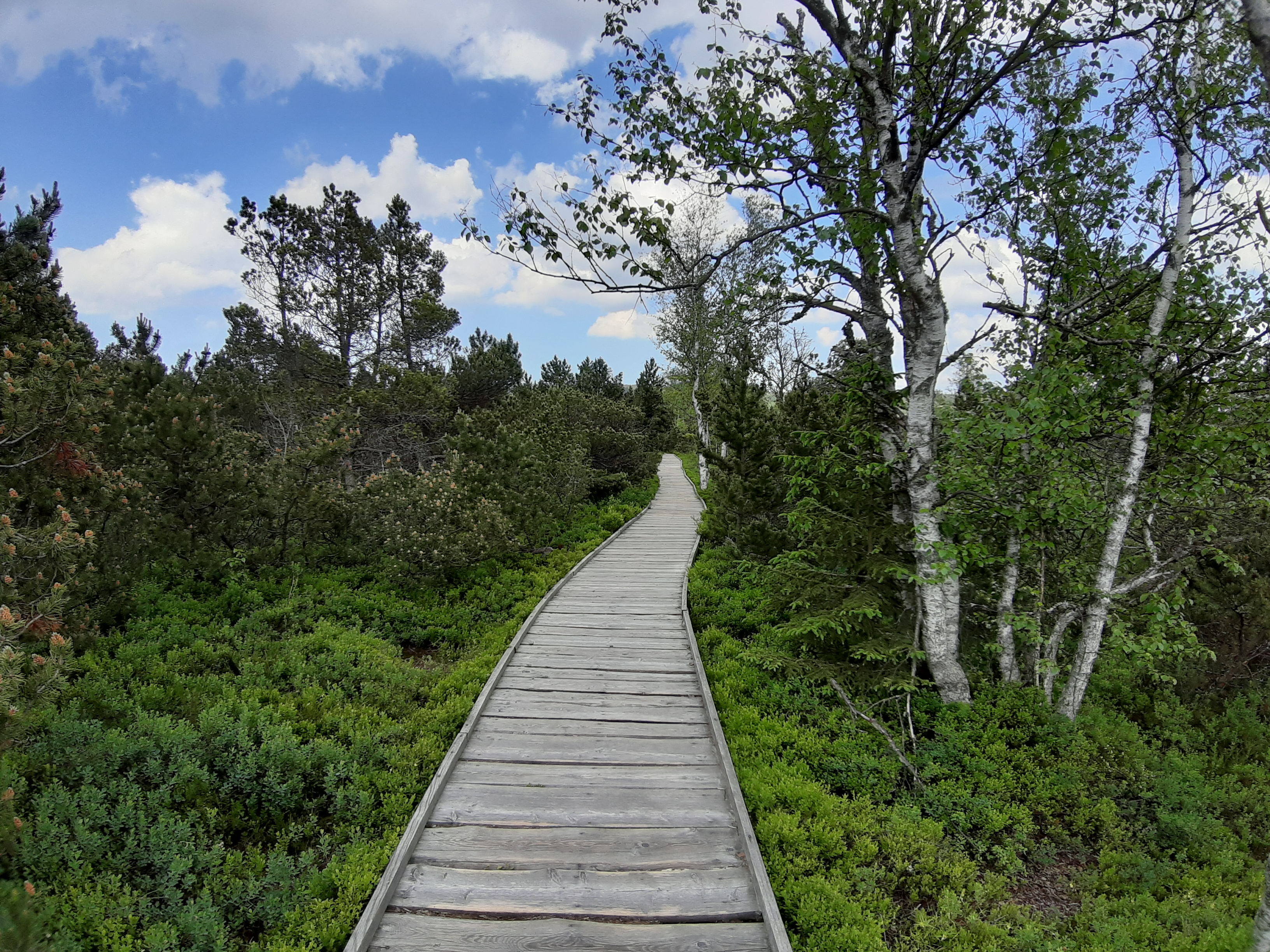 Chalupská slať (Šumava).